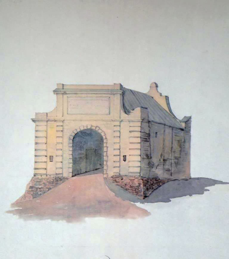 Беларуская (тарашкевіца): Нясьвіж (Niaśviž), Слуцкая брама (Słuckaja brama)